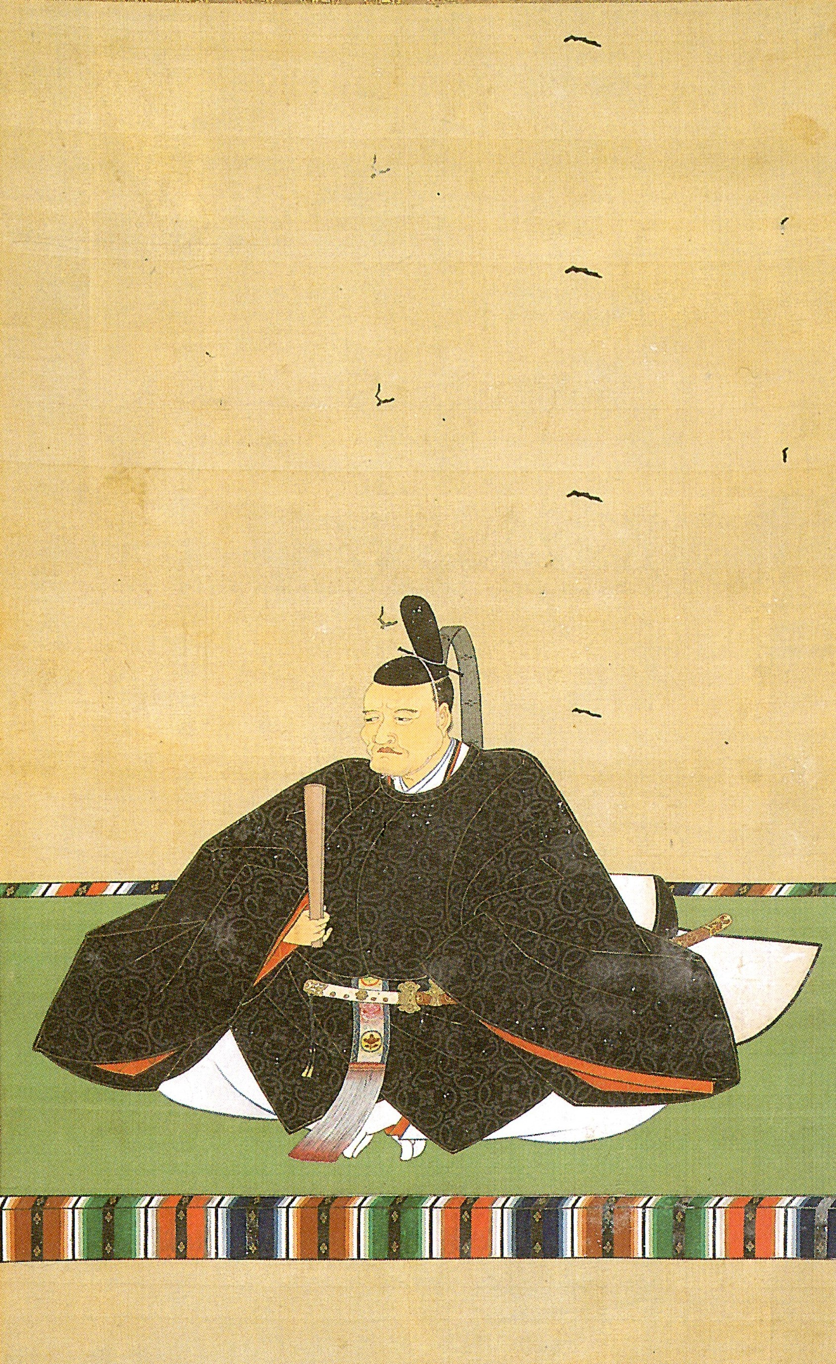 井伊直興の肖像。